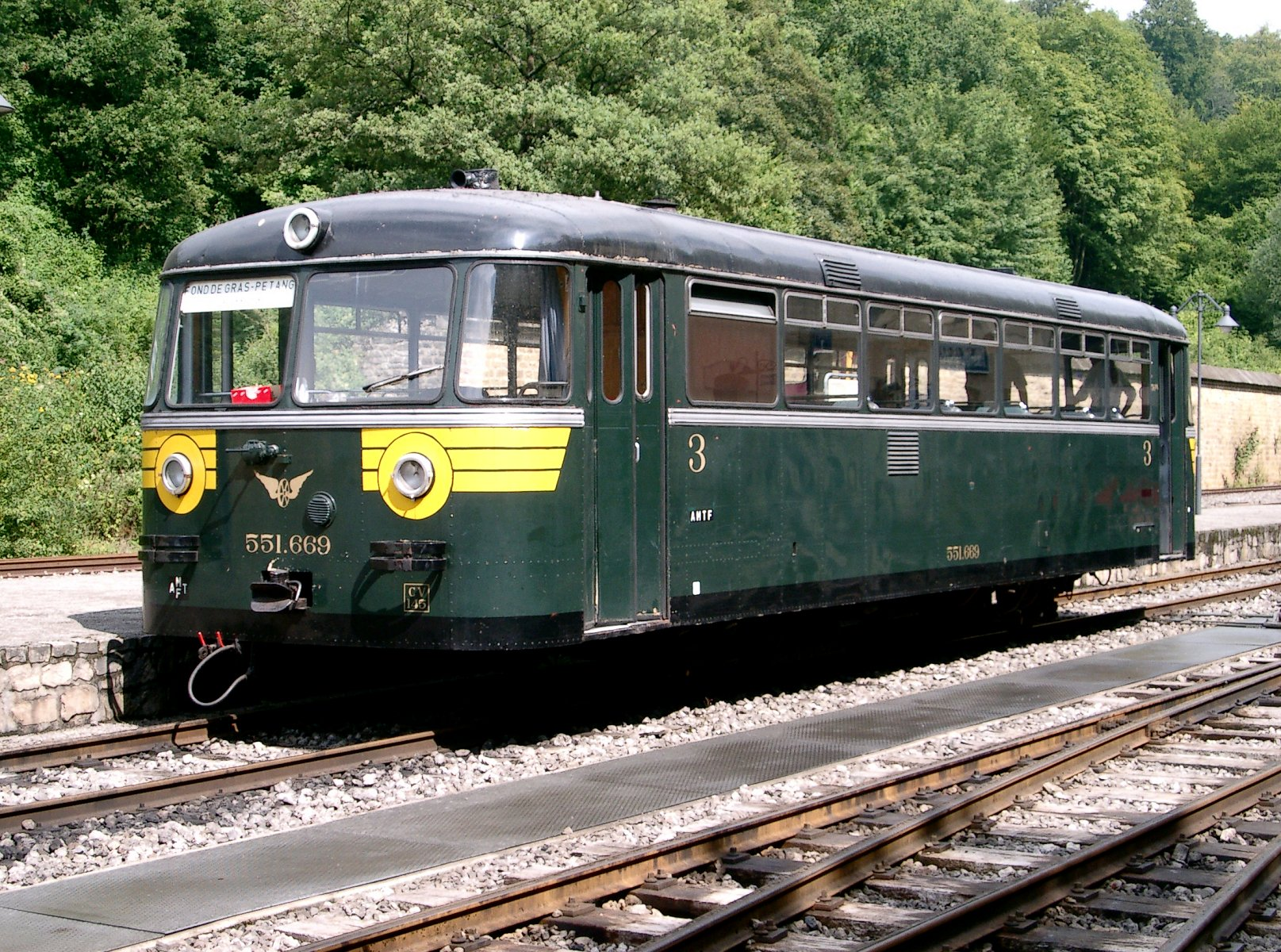 Uerdinger 551669